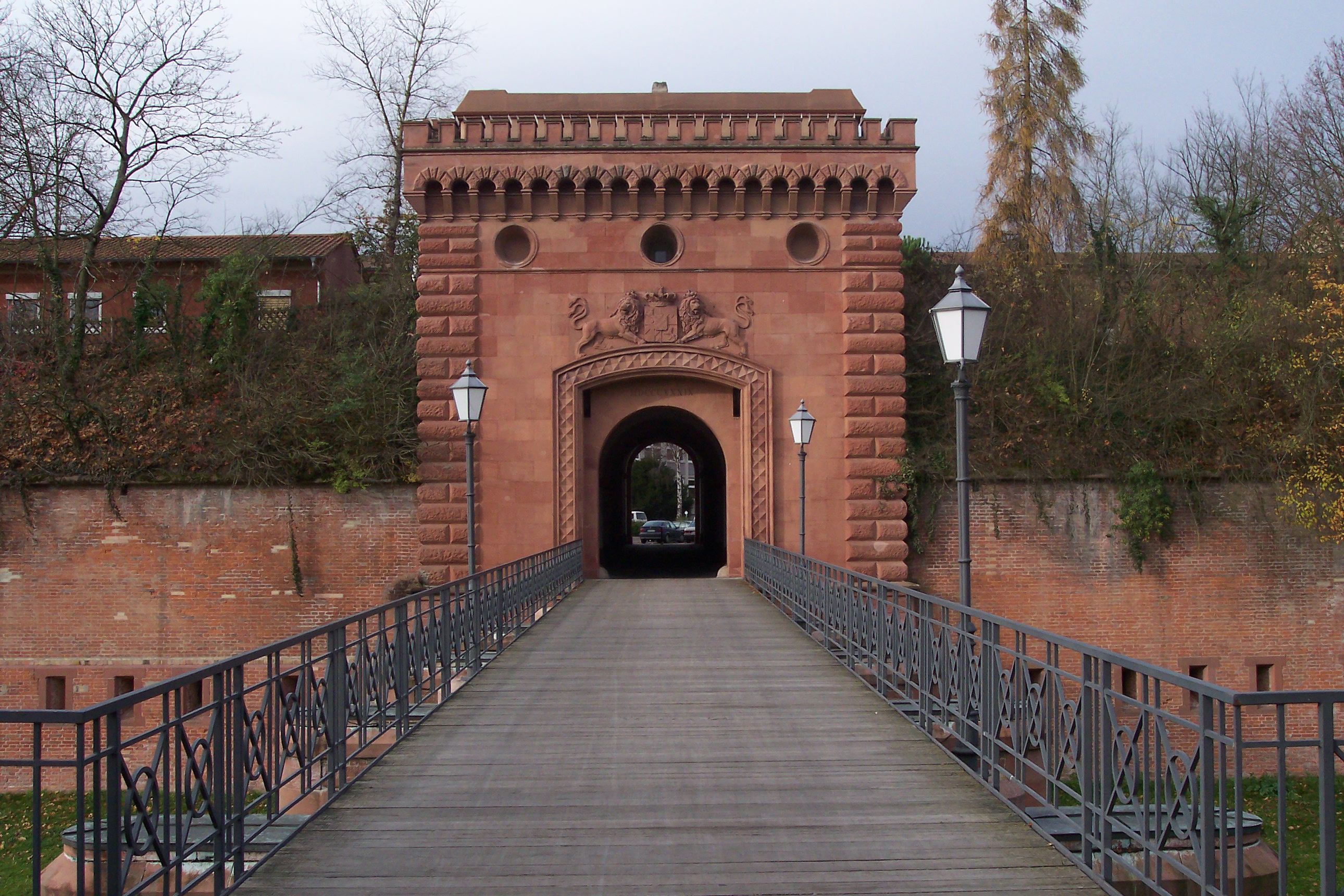 Germersheim. Das Weissenburger Tor (von „außen“ gesehen) – heute inoffizielles Wahrzeichen der Stadt. Germersheim, ehemalige Festungsanlagen: Weissenburger Tor.